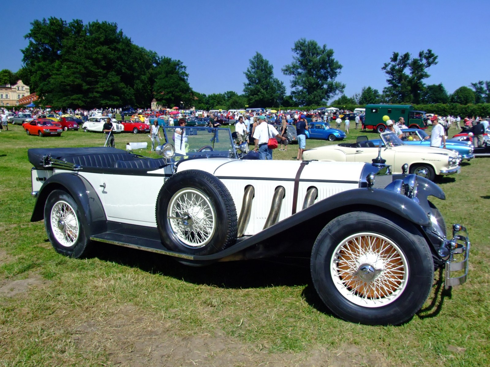 Quelle: selbst fotografiert, 06/2007 Fotograf: Späth Chr.